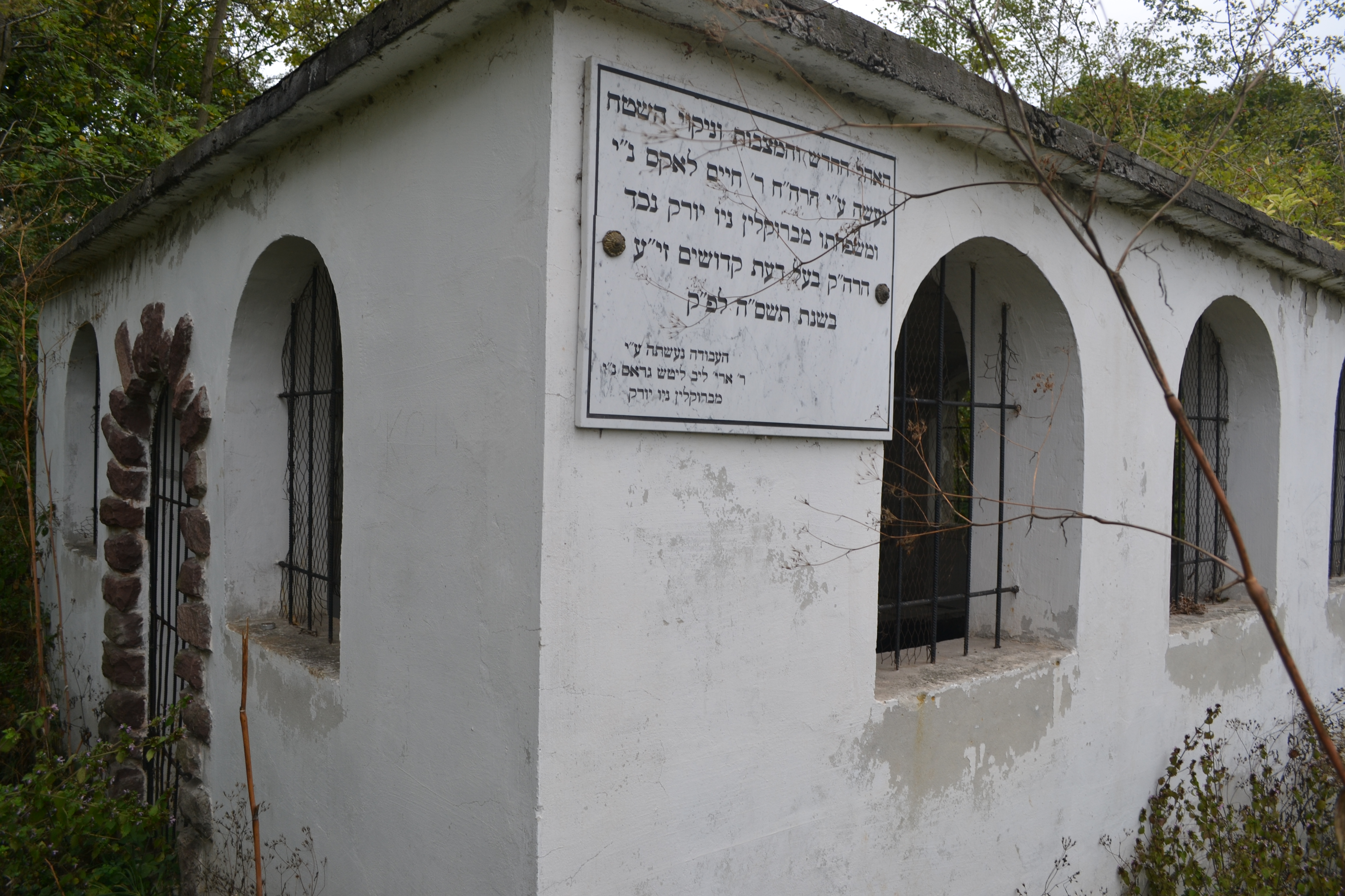 Хасидська гробниця, Бучач, єврейський (діял. жидівський) цвинтар